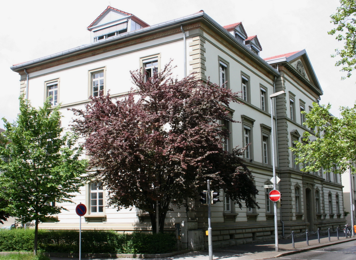 Amtsgericht Konstanz in Konstanz